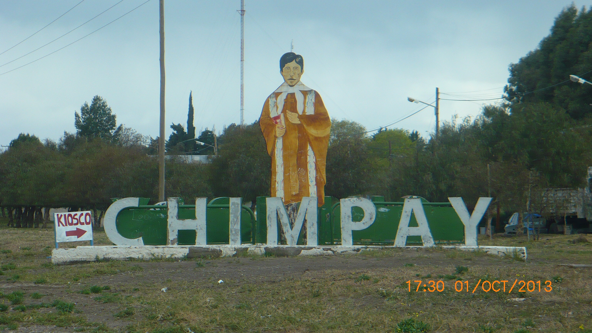 Entrada a Chimpay